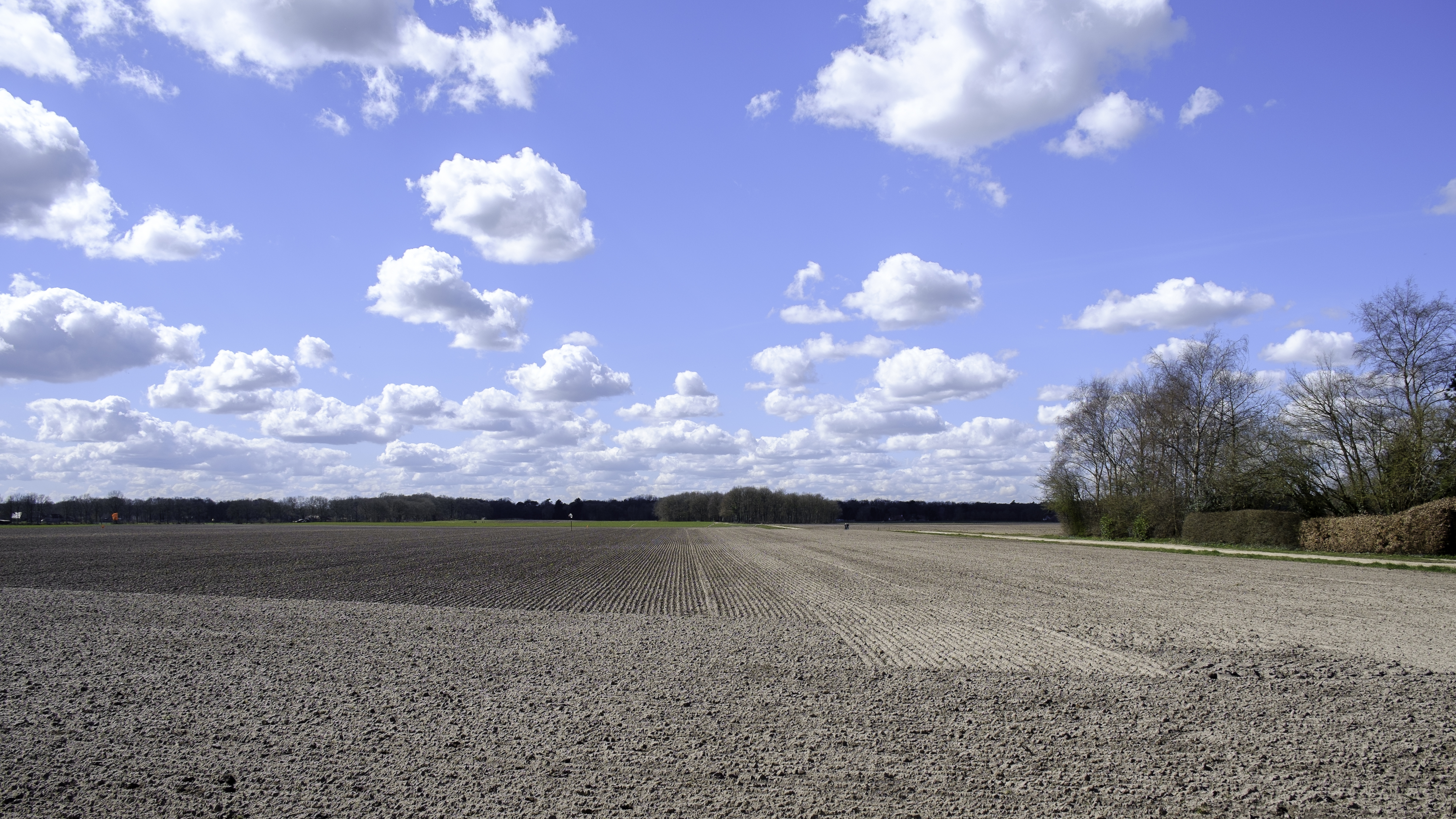 Noordlaarder es